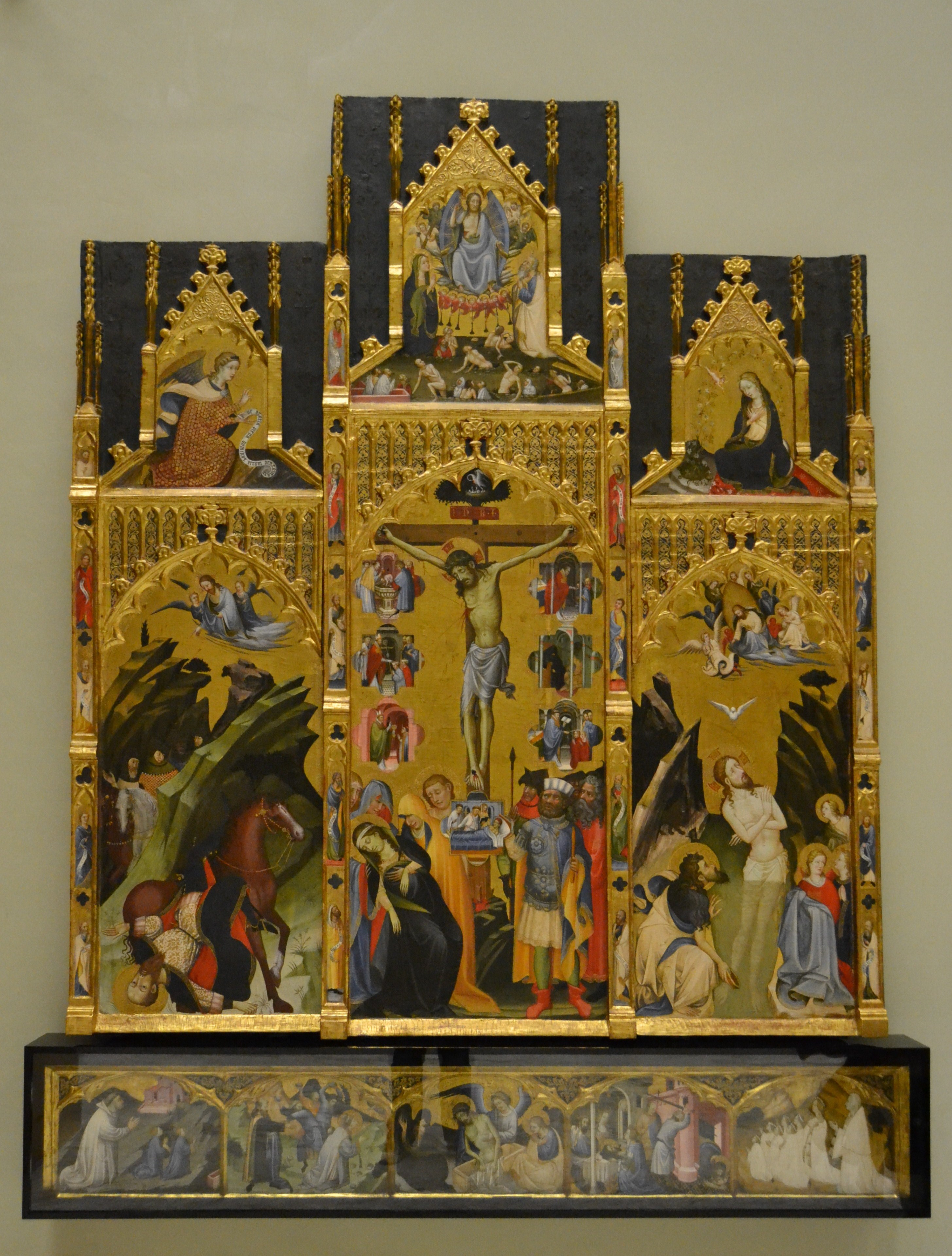 Esta obra, conocida como el Retablo de los Sacramentos o el Retablo de Fray Bonifacio Ferrer, fue realizada a finales del siglo XIV.